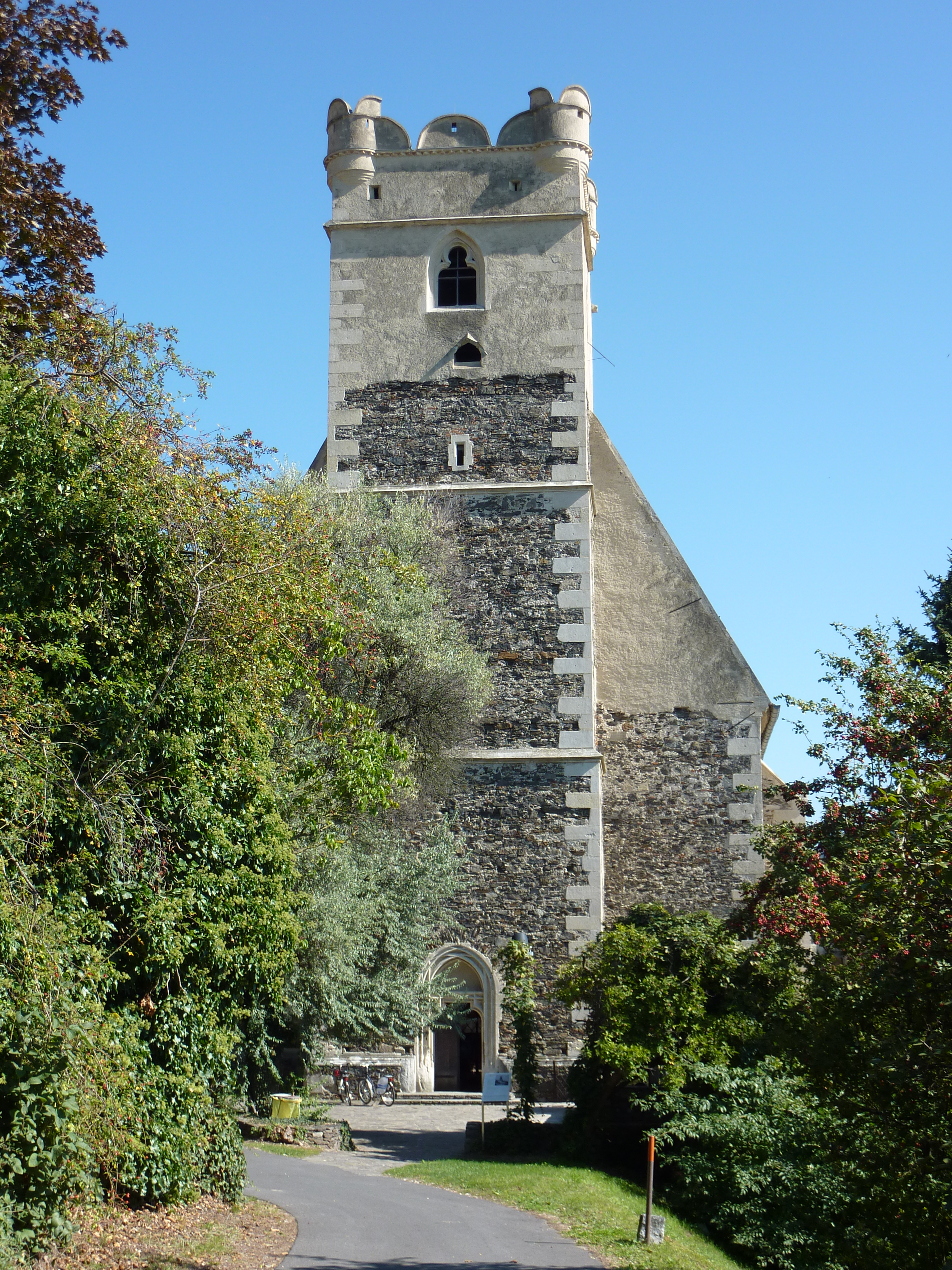 Filialkirche in St. Michael, Weißenkirchen in der Wachau, Niederösterreich